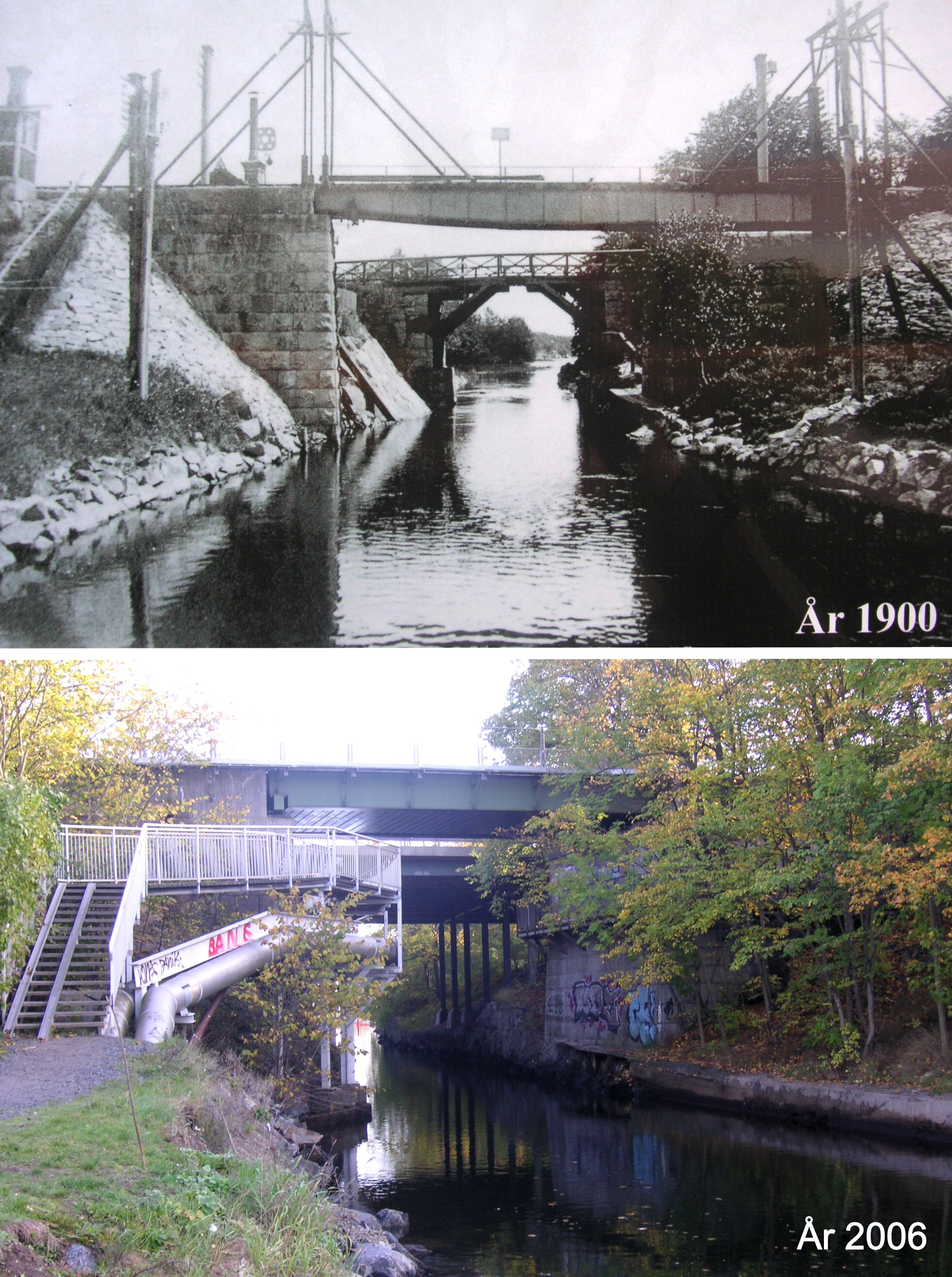 Ålkistan då och nu